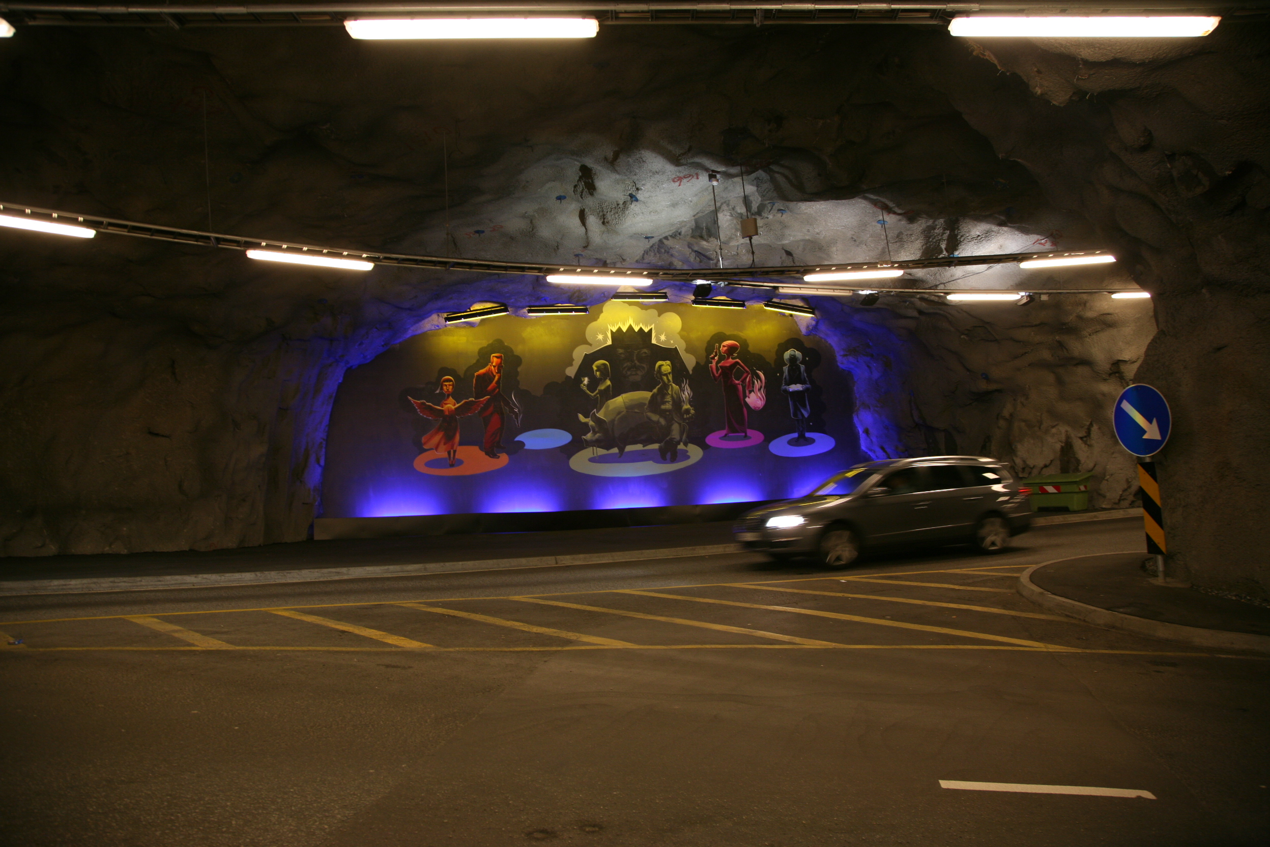 Klostergarasjen in Bergen